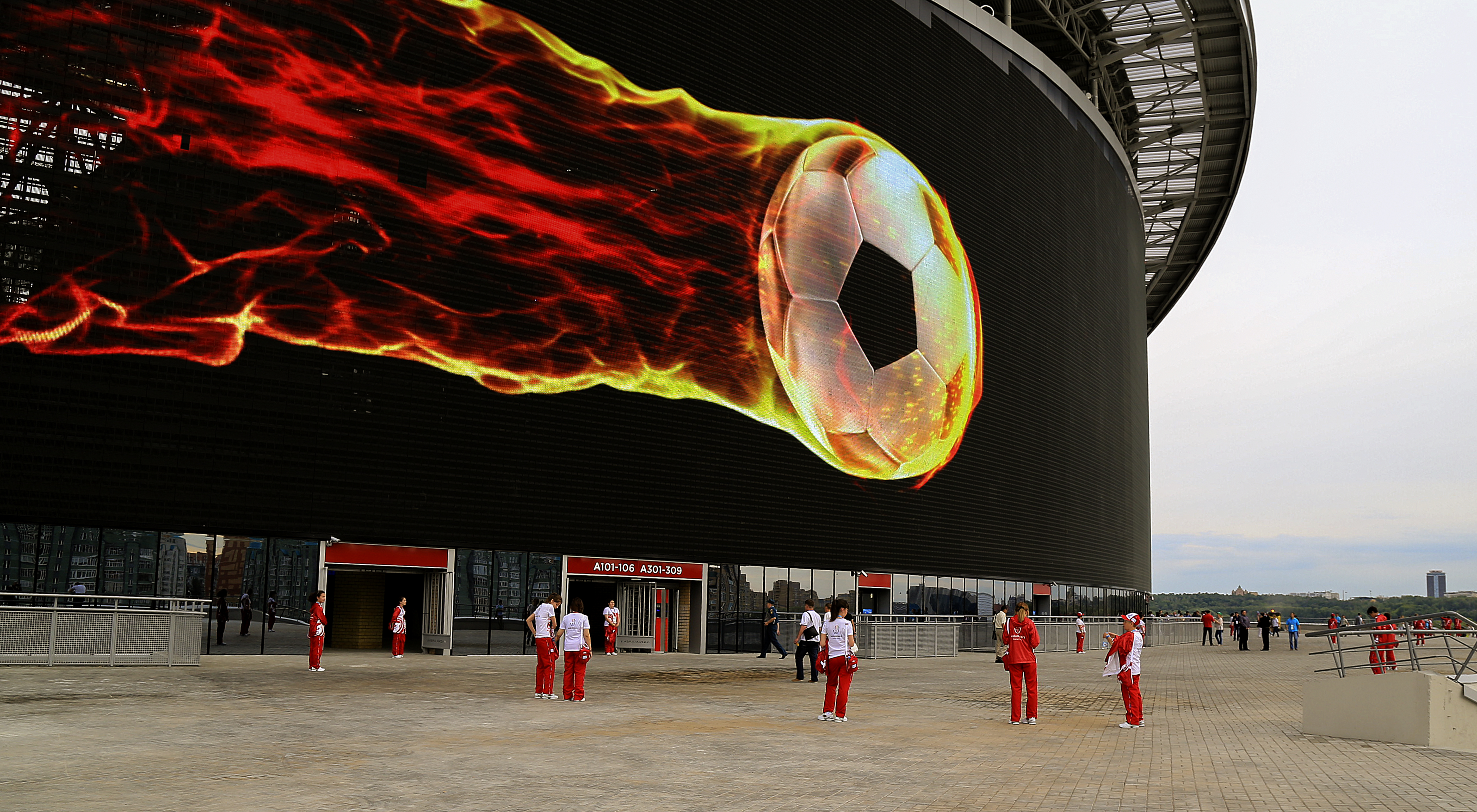 Медиафасад стадиона Казань Арена